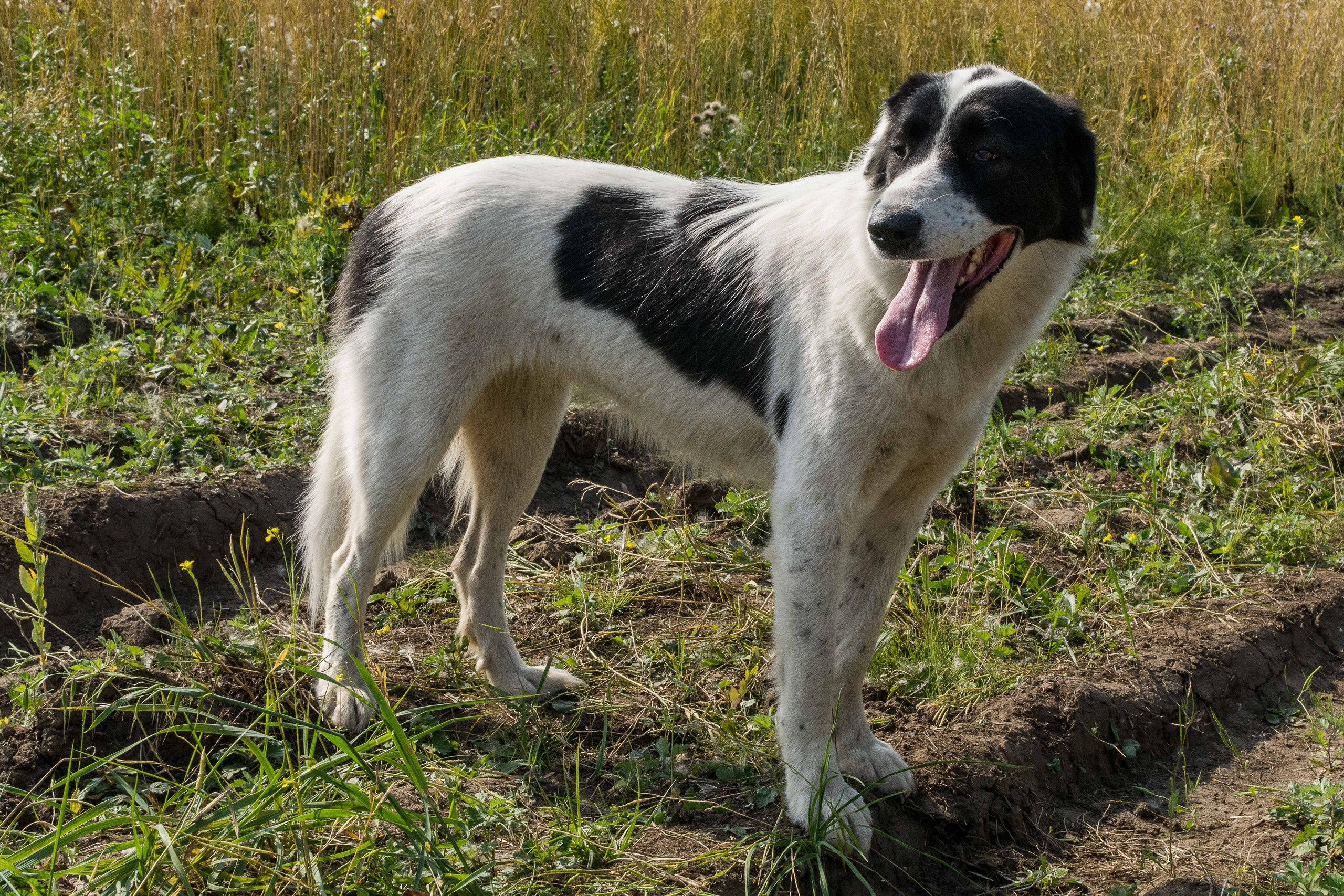 Настоящая Звезда Онза Монгун - молодая сука тувинской овчарки окрас белый с черным, лето 2018 год, город Тверь. Владелец Шафеева Я. Г.